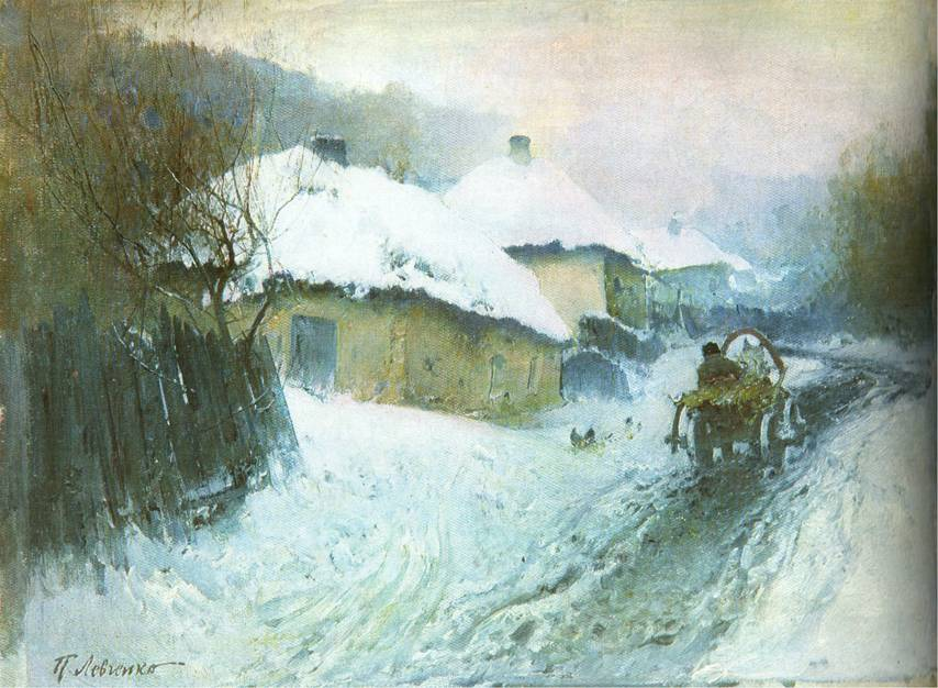 Glukhomanlabel QS:Len,"Glukhoman" label QS:Luk,"Глухомань"